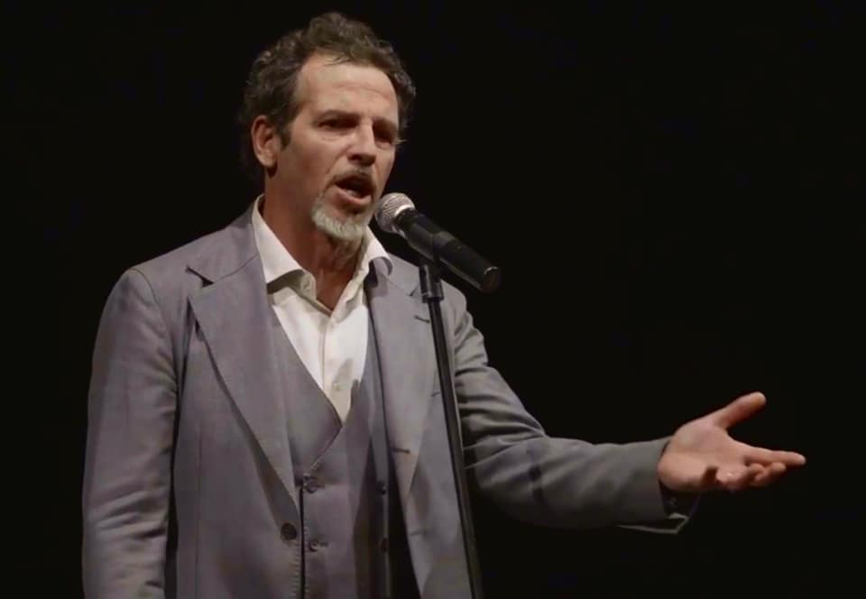 Germano Lanzoni in scena durante uno dei suoi spettacoli